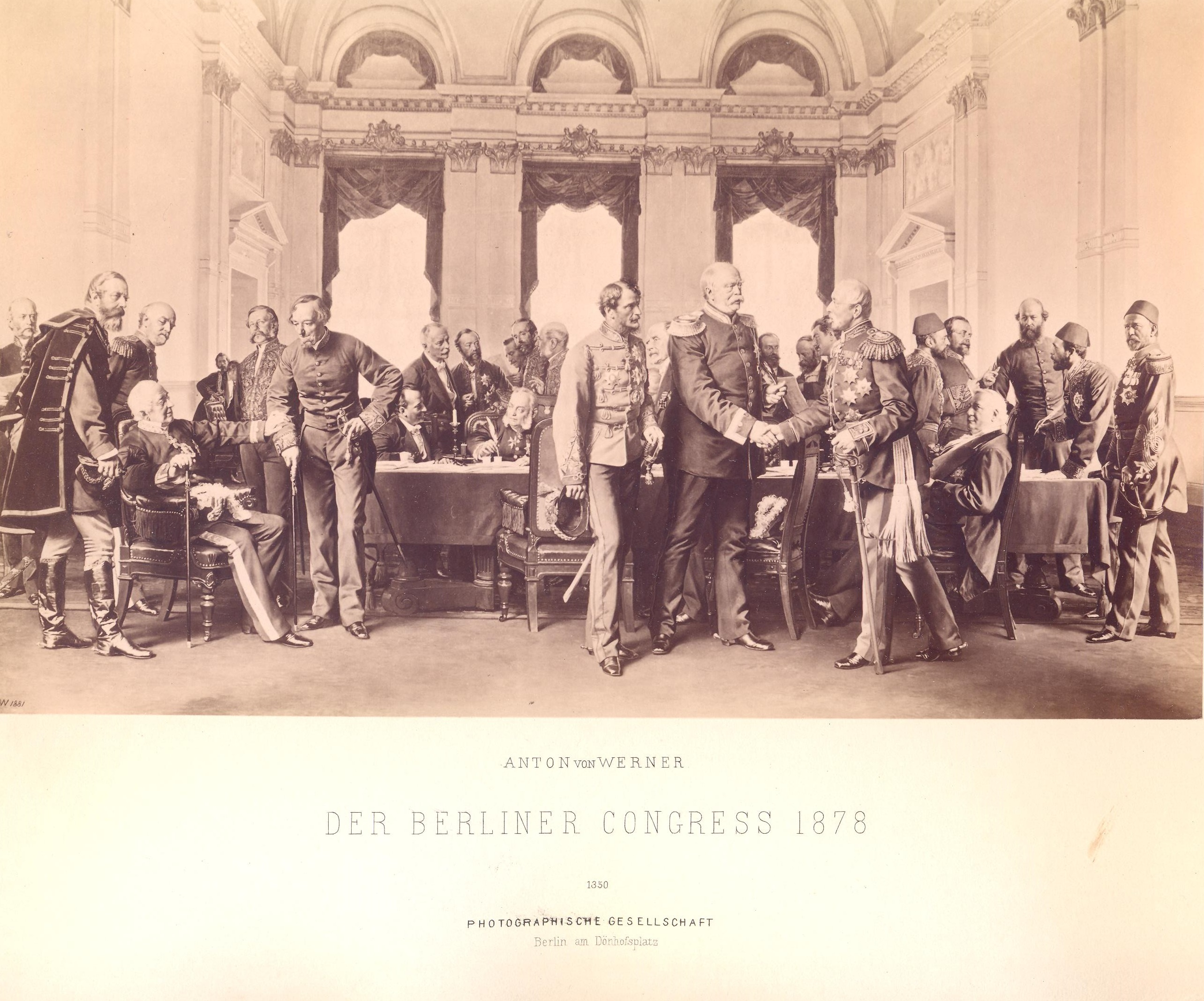 Берлинският конгрес от 1878 г., Албум със снимки на Бисмарк, издаден по случай 80-годишнината му в Берлин, 1895 г. Хайнрих Карл фон Хаймерле (Австро-Унгария). Алойс Граф Кароли (Австро-Унгария). Едуардо до Лоней (Италия). Александър Горчаков (Русия). Уилиям Анри Уадингтон (Франция). Бенджамин Дизраели (Англия). Йозеф Мария фон Радовиц (представител, Германия). Хлодвиг цу Хохенлое-Шилингсфюрст (Германия). Луиджи Корти (Италия). де Мун (протоколант, Франция). Сен Валие (Франция). Пол Депри (Франция). Барон д'Убри (Русия). Андраши (Австро-Унгария). Лотар Бухер (Германия). Ото фон Бисмарк (Германия). Пьотър Шувалов (Русия). Бернхард Ернст фон Бюлов (Германия). Фридрих фон Холщайн (Германия). Мориц Буш (германски публицист). Херберт Бисмарк (секретар на баща си). Садуллах бей (Османска империя). Одо Ръсел (Великобритания). Роберт Гаскойн-Сесил (Великобритания). Александър-паша Каратеодори (Османска империя). Мехмед паша (Османска империя)